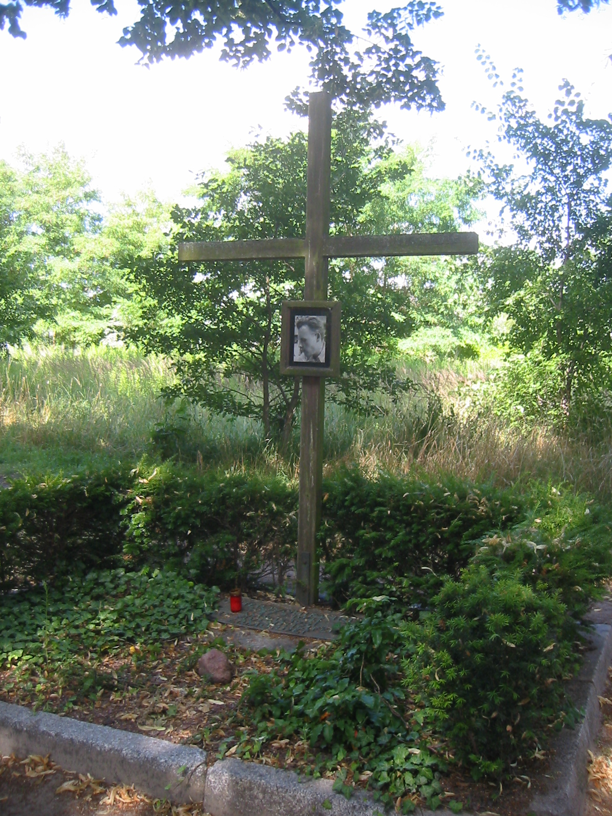 Holzkreuz in Gedenken an Dieter Wohlfahrt, aufgenommen an der Ecke Hauptstraße/Bergstraße in Berlin-Spandau